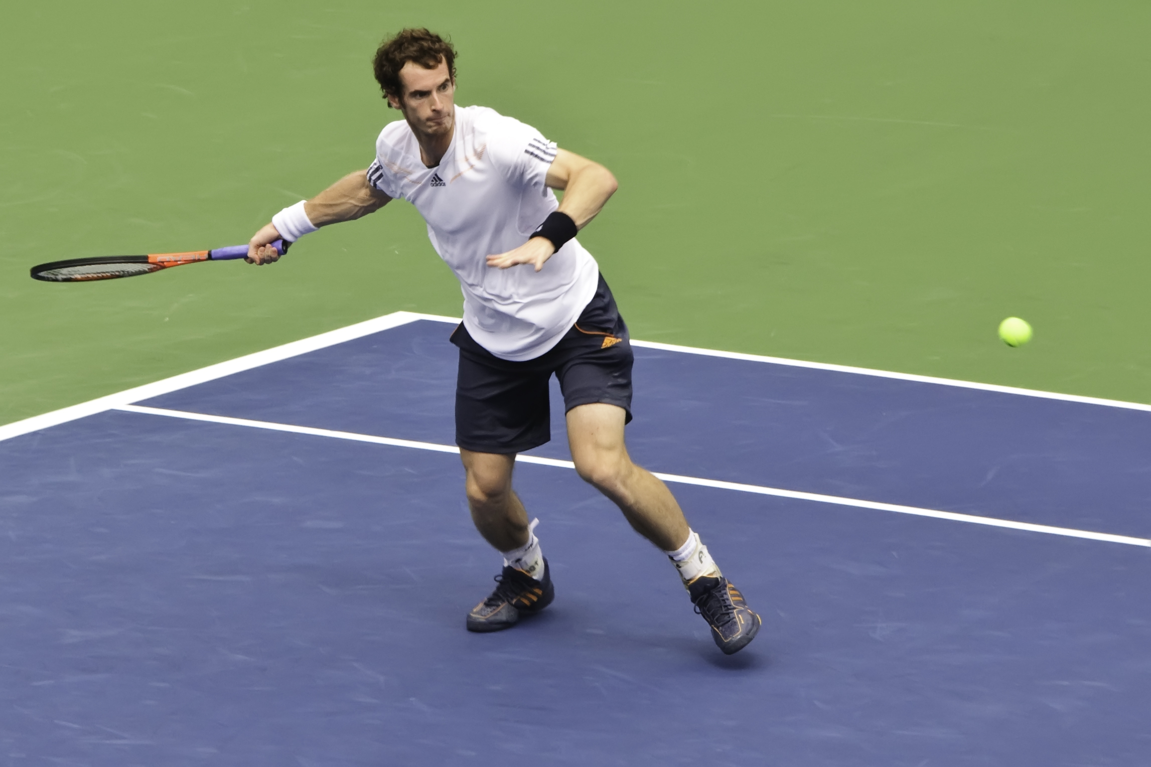 Andy Murray à l'US Open en 2012.